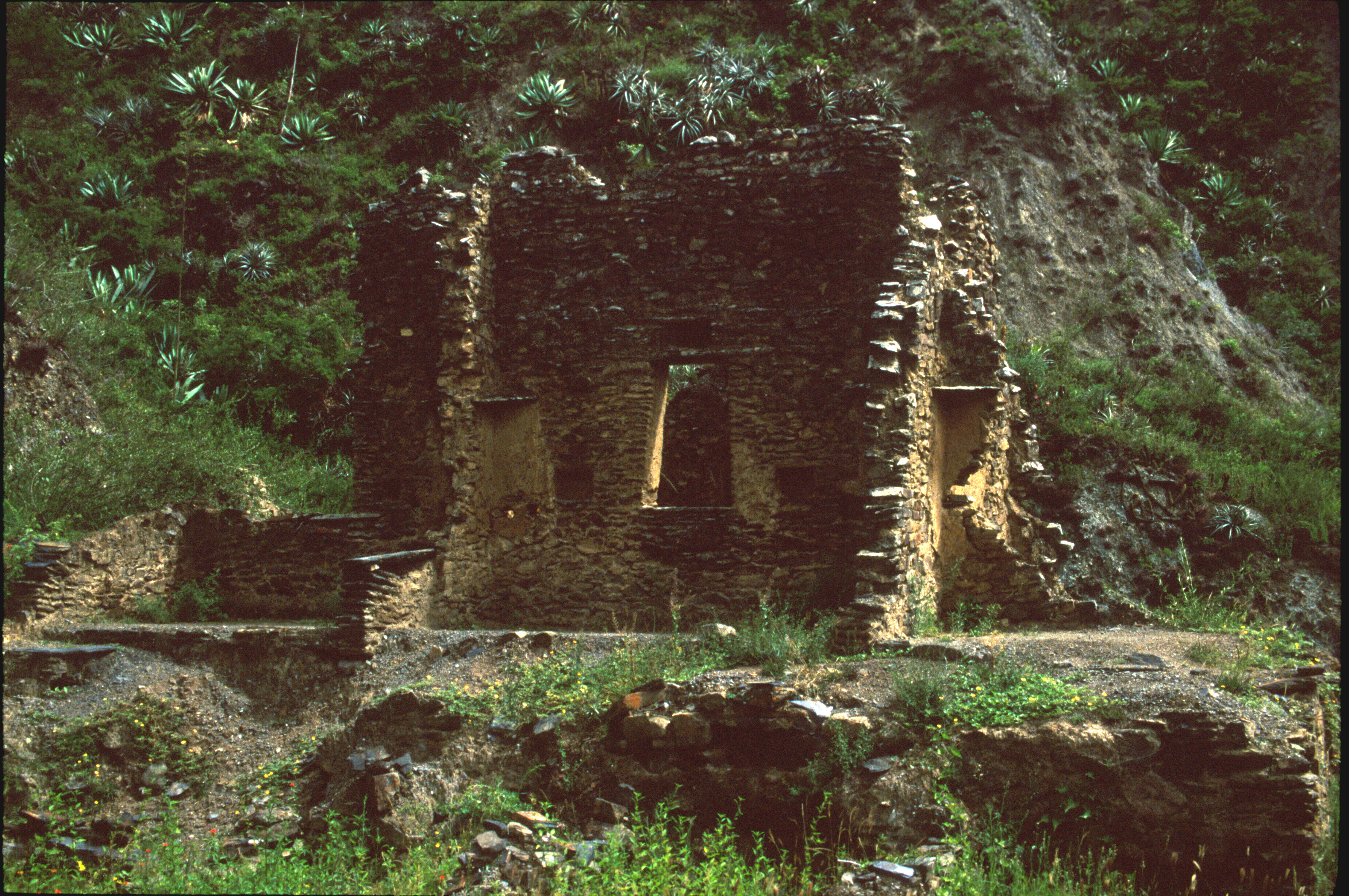 Ruinas Arqueológicas de la ciudadela de Iskanwaya This medium shows the protected monument with the number L/00-305 in Bolivia.